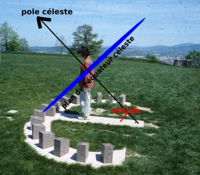 schéma ajouté à un cadran solaire analemmatqiue